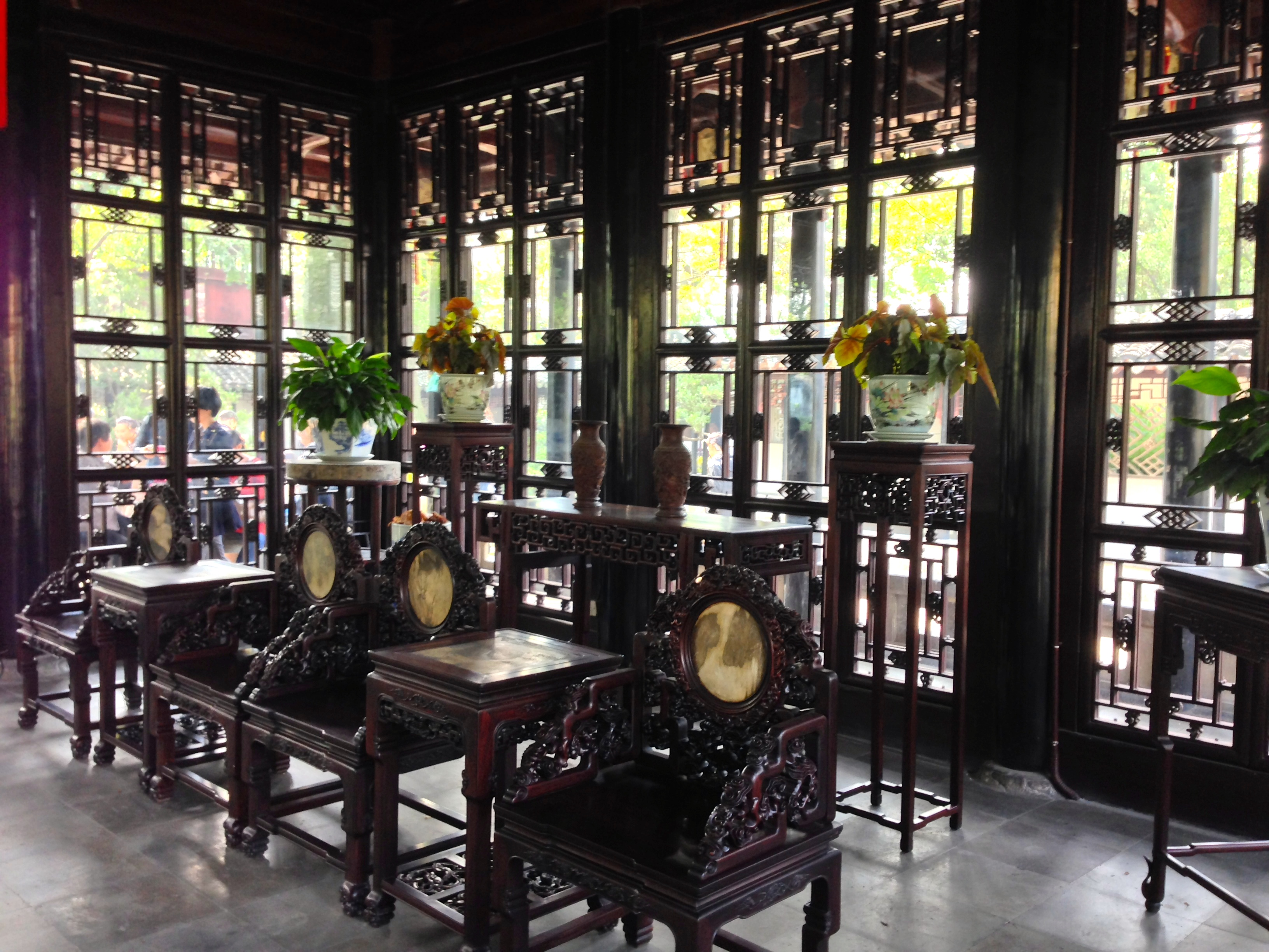 拙政園